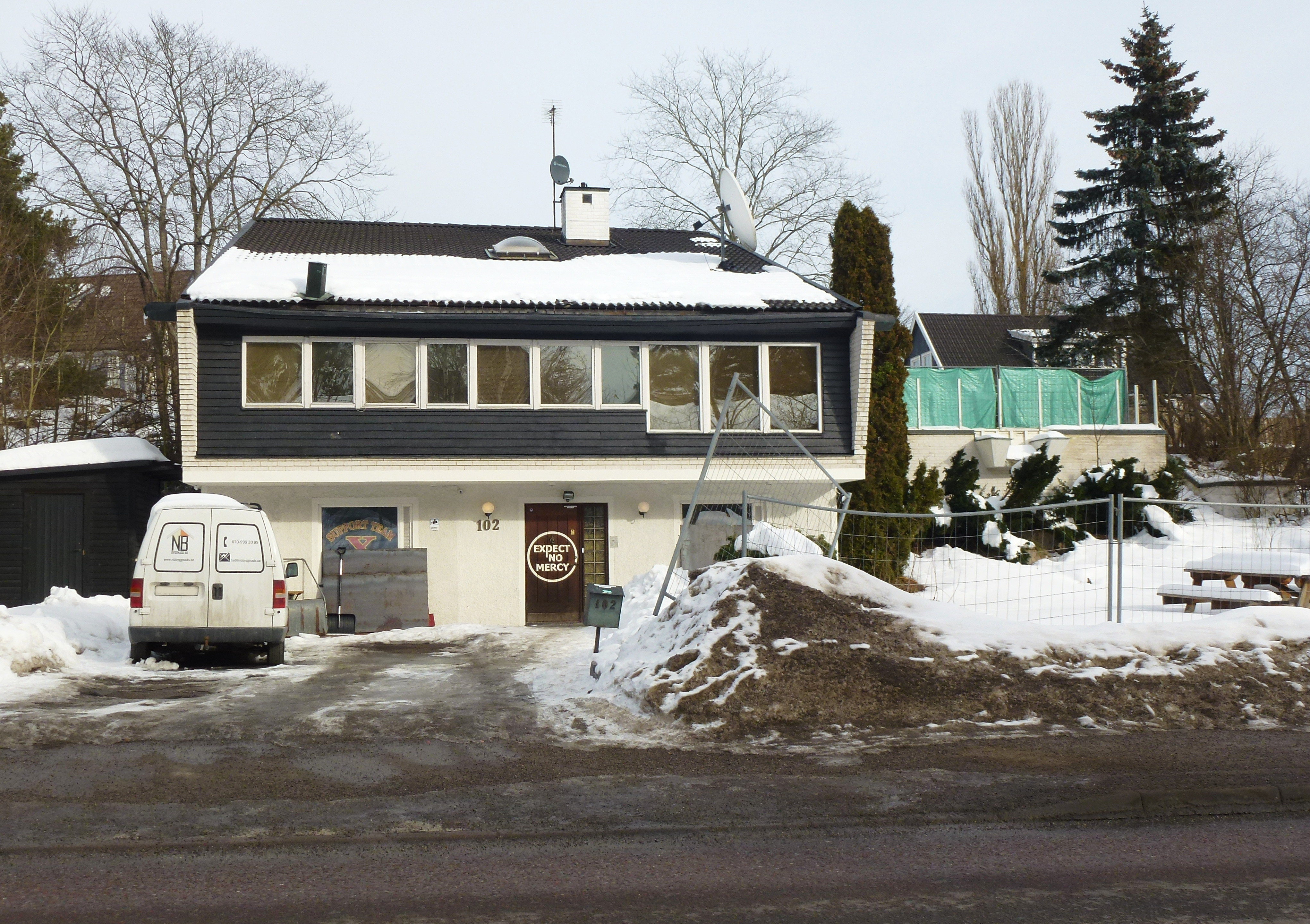 Bandidos MC villa, Häradsvägen 102 i Huddinge